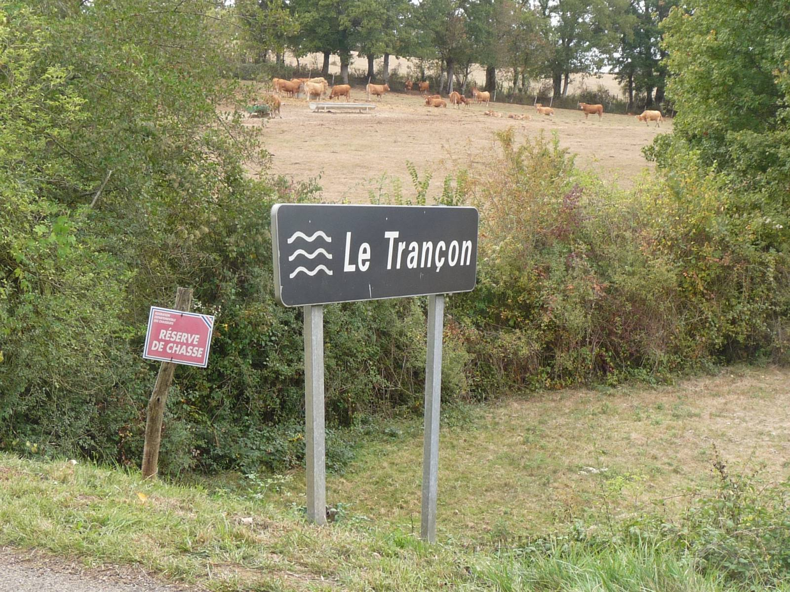 le Transon (ou Trançon) entre Pleuville et Benest, Charente, France